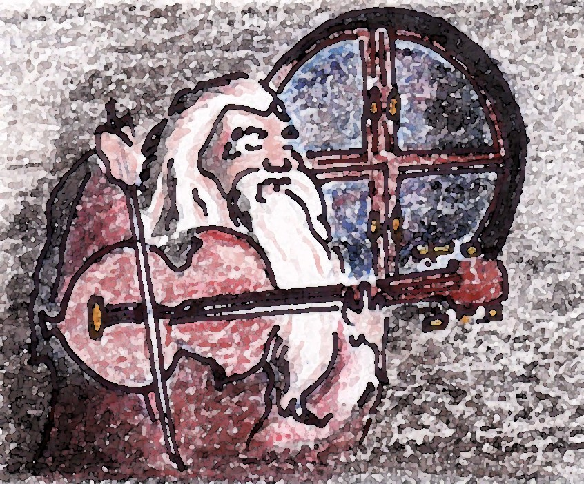 El enano Balin tocando la viola en Bolsón Cerrado.